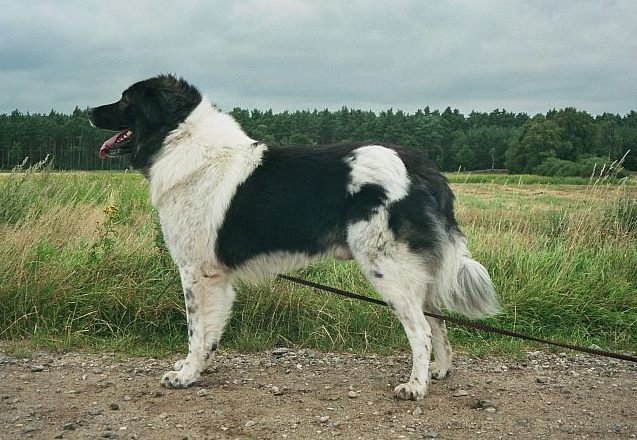 Karakatschan